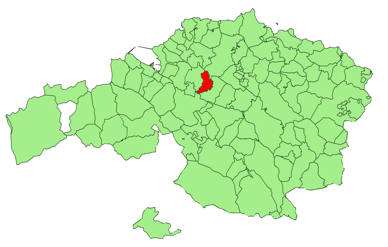 Derioko udalerriaren kokapena.